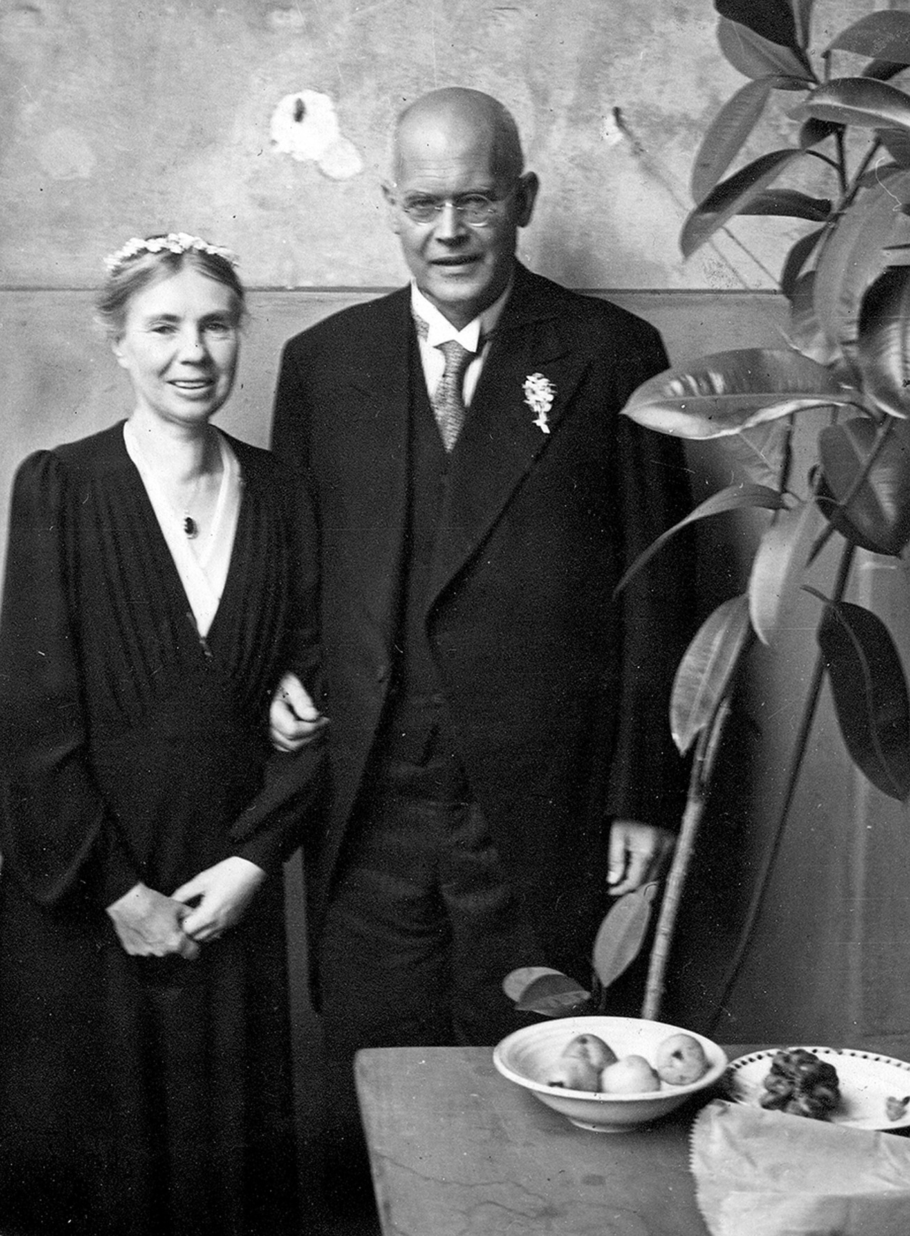 Dehn, Günther mit Ehefrau Luise Silberhochzeit Berlin 1941, Prüfungskommission der Bekennenden Kirche, Professor für Praktische Theologie, Universität Halle und Universität Bonn, Fotosammlung, Bestand: AEKR Düsseldorf 8SL 046 (Bildarchiv), 013_0128